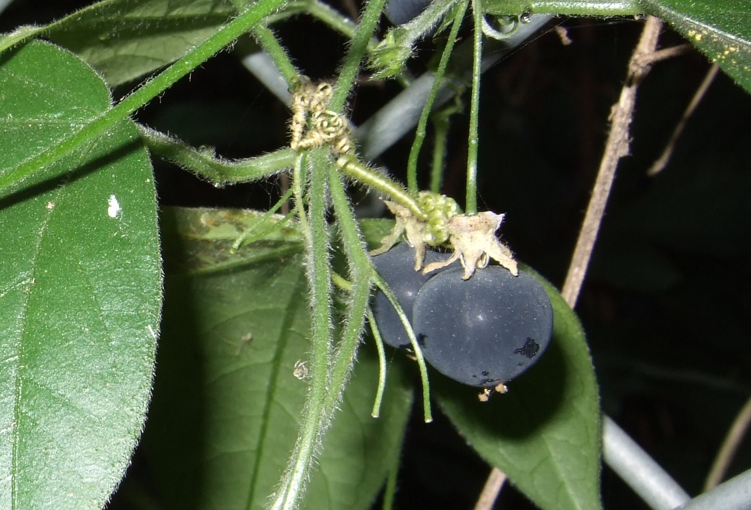 Saⁿ-kak-hio̍h se-hoan-liân ê kóe-chí